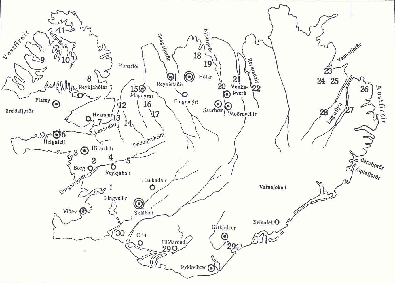 Schauplätze wichtiger Isländersagas